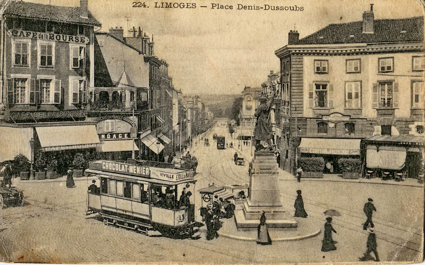 Carte postale ancienne sans mention d'éditeur, n°224 : LIMOGES - Place Denis-Dussoubs